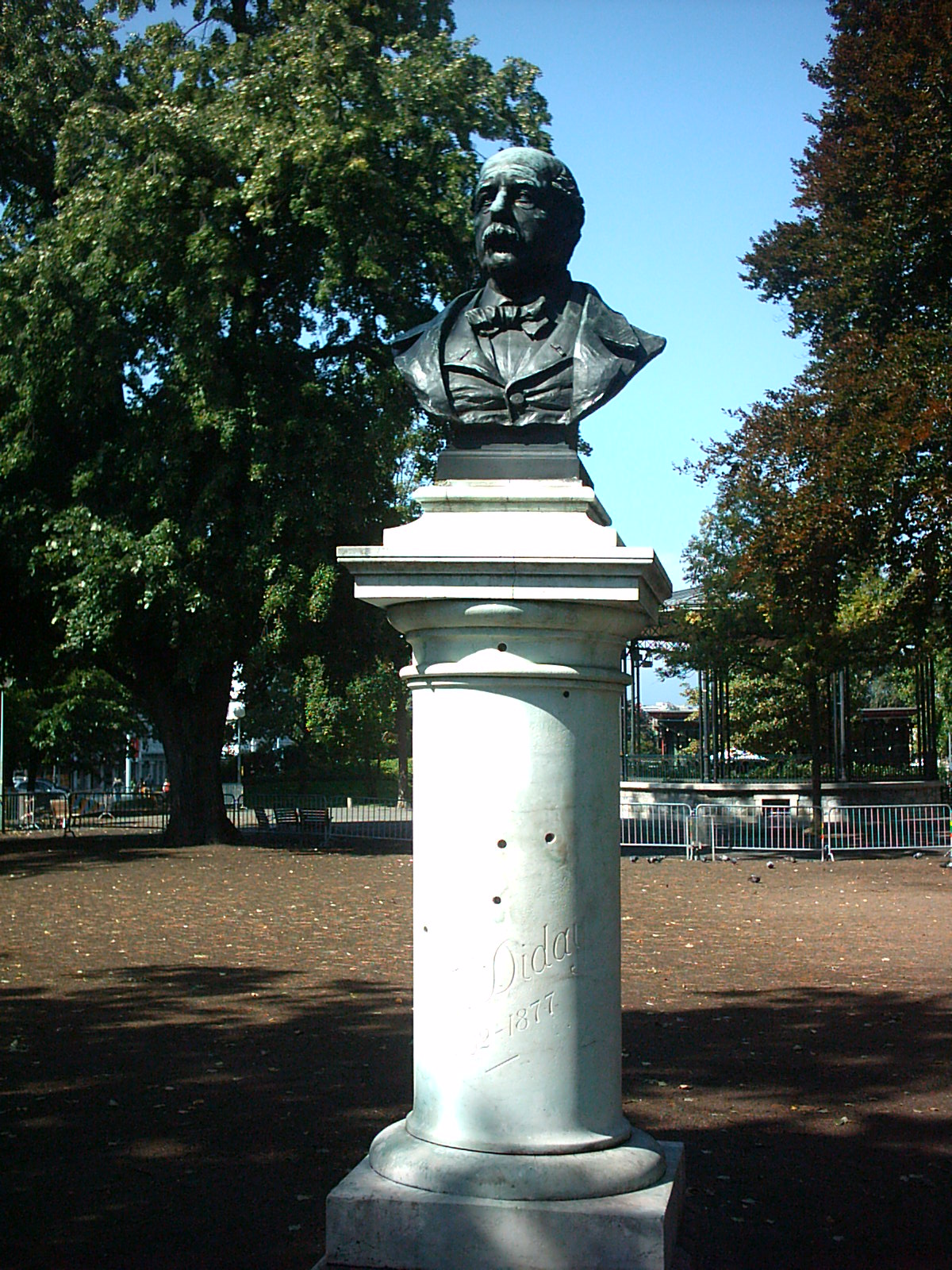 Statue de François Diday dans le Jardin anglais de Genève (Suisse)